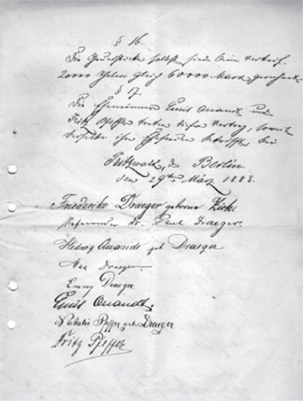 Die letzte Seite des Quandt-Draegerschen Gesellschaftervertrags vom 29. März 1883 mit den Unterschriften u.a. von Fredericke Draeger, Paul Draeger, Hedwig Quandt geb. Draeger, Max Draeger, Emmy Draeger, Emil Quandt, Nathalie Pfeffer geb. Draeger und Fritz Pfeffer, quasi das Gründungsdokument der späteren Quandt-Gruppe.